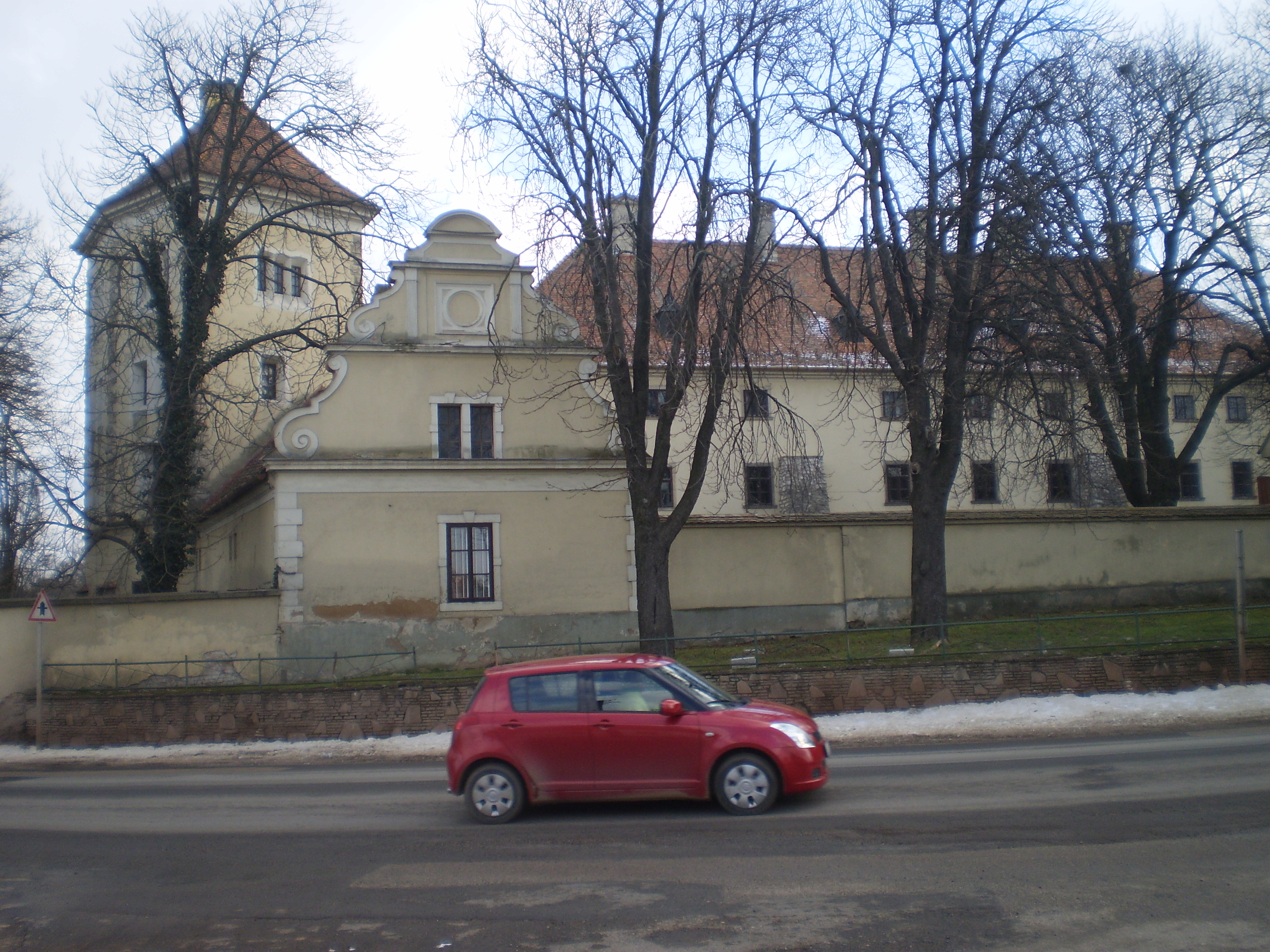 Devecseri kastély